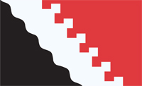 Joensuun lippu